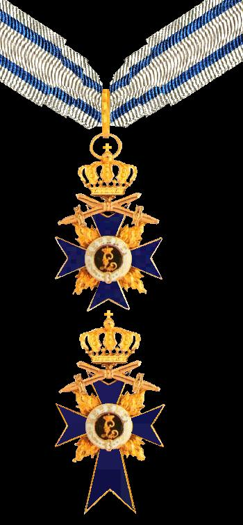 Militärverdienstorden (Bayern) Komtur mit Schwertern und Krone (oben) Offizierskreuz mit Schwertern und Krone (unten).